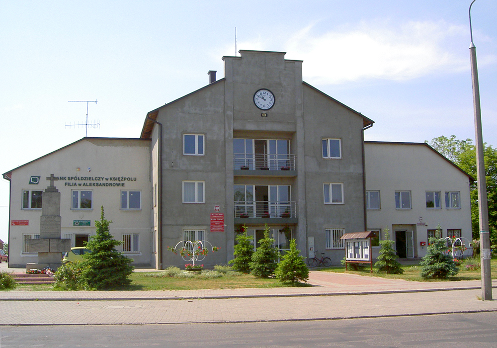 Aleksandrów (powiaat biłgorajski) • Urząd Gminy / Commune Council